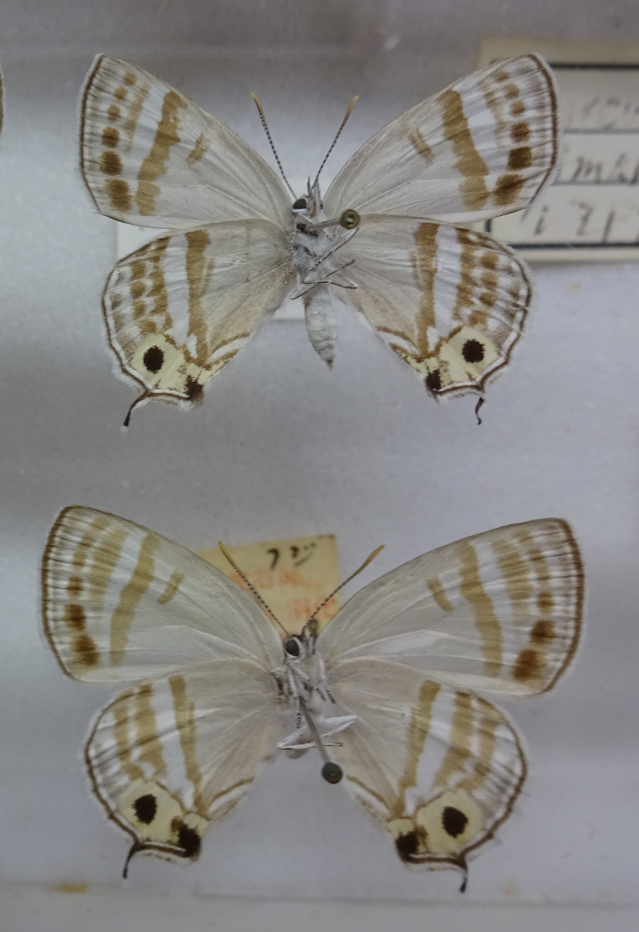 フジミドリシジミ